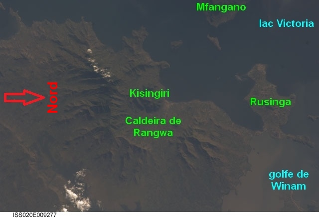 Notation des lieux sur l'image ISS020-E-9277.jpg